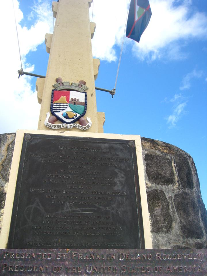 Plaque presented by F.D. Roosevelt to the people of St. Eustatius